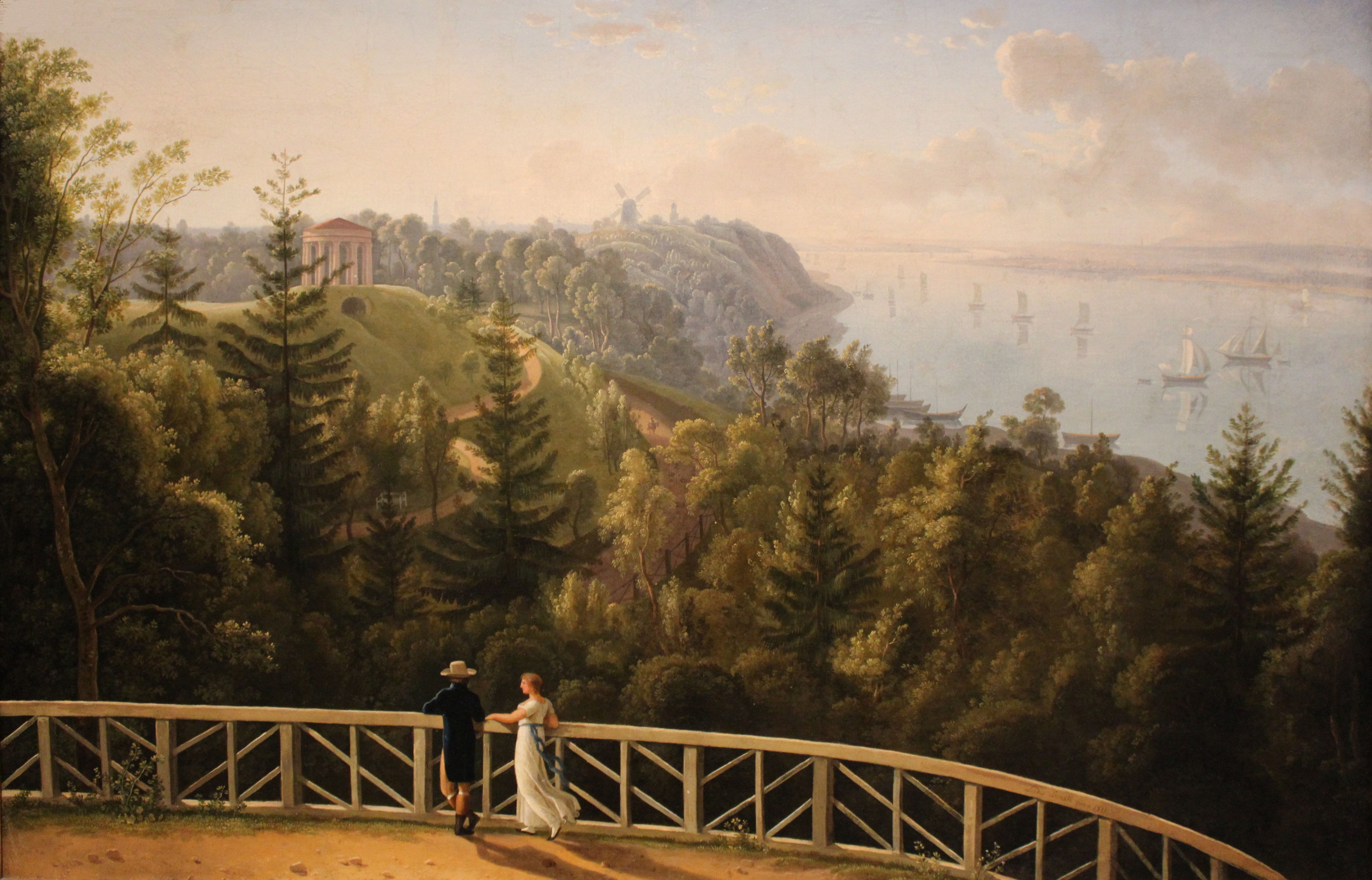 Gartenanlage mit dem chinesischen Turm, künstliche Burgruine, Waldhütten, Grotten, Rundtempel